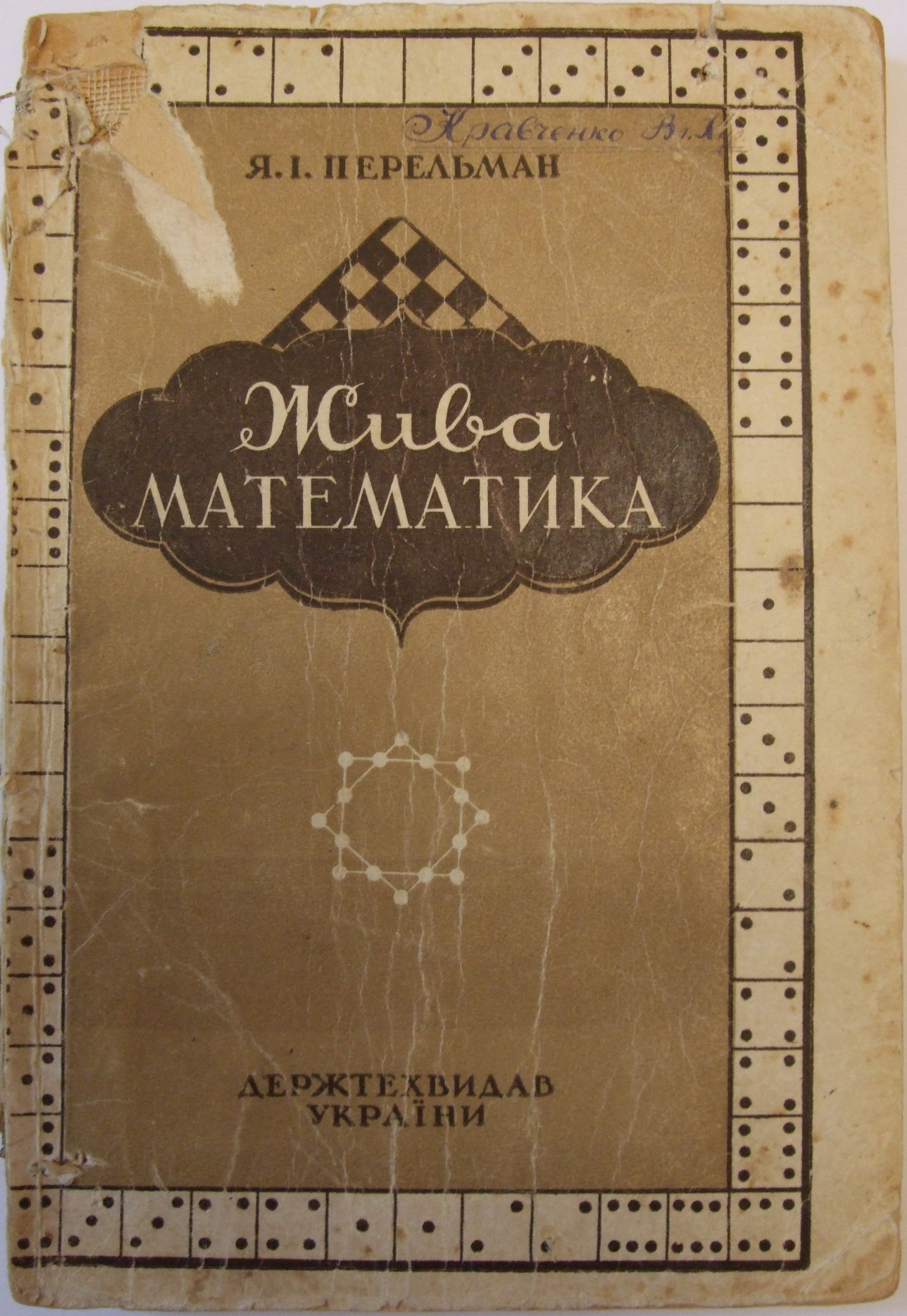 Титульна сторінка обкладинки книги "Жива математика" (Я.І. Перельман)